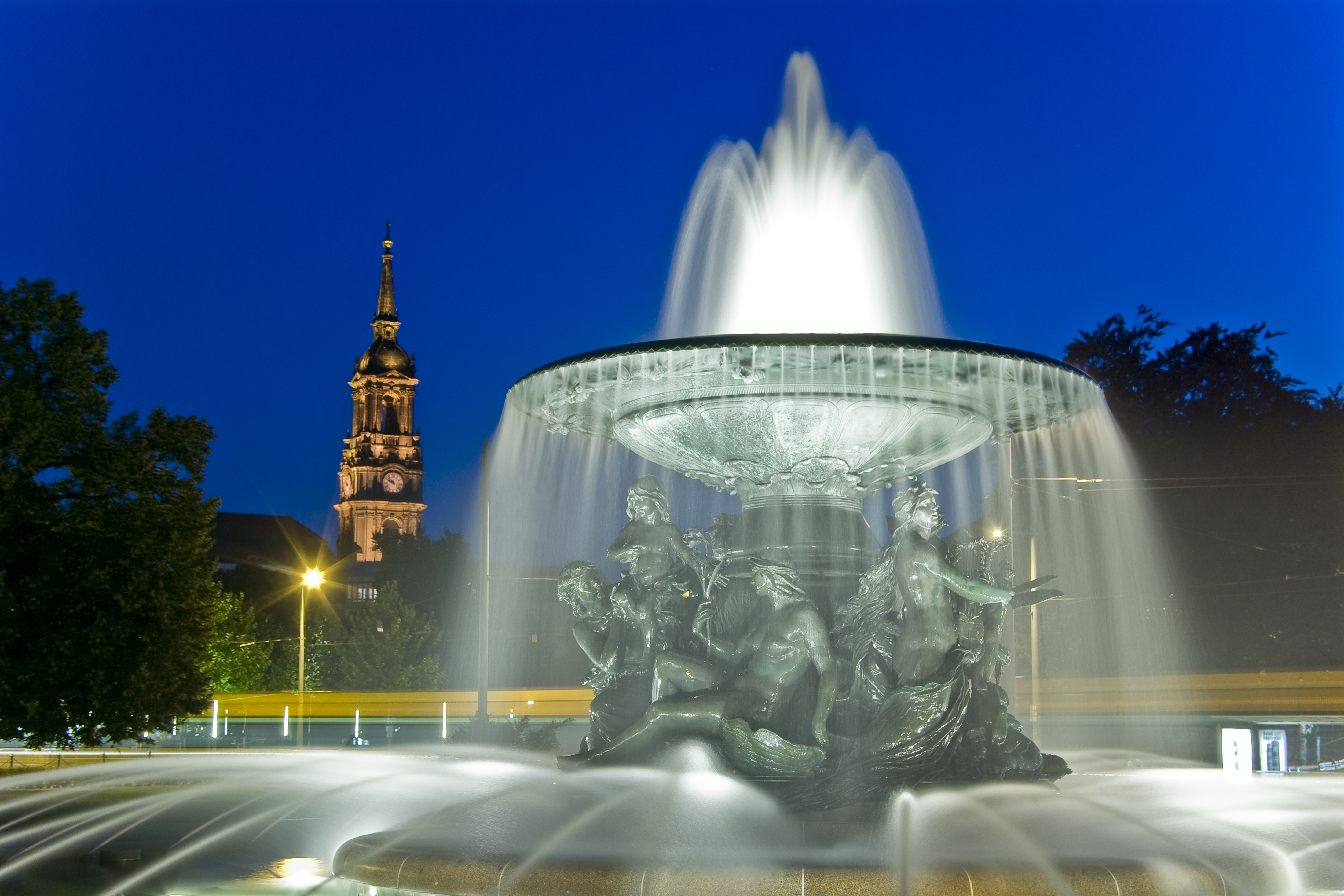 Brunnen „Stille Wasser“ auf dem Albertplatz in Dresden, geschaffen 1883–1894 von Robert Diez